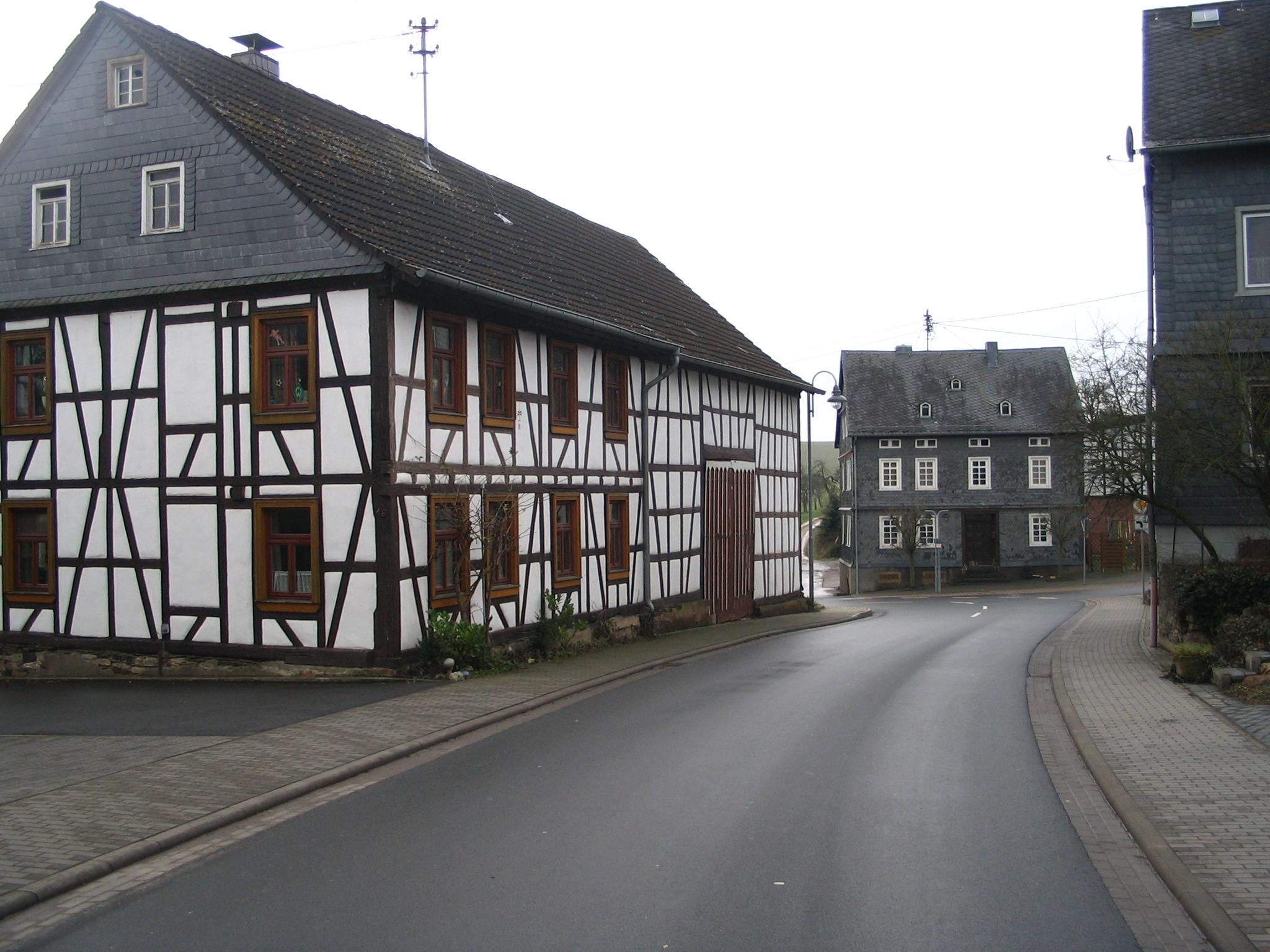 Dorftrasse Rohrbach, Hunsrück